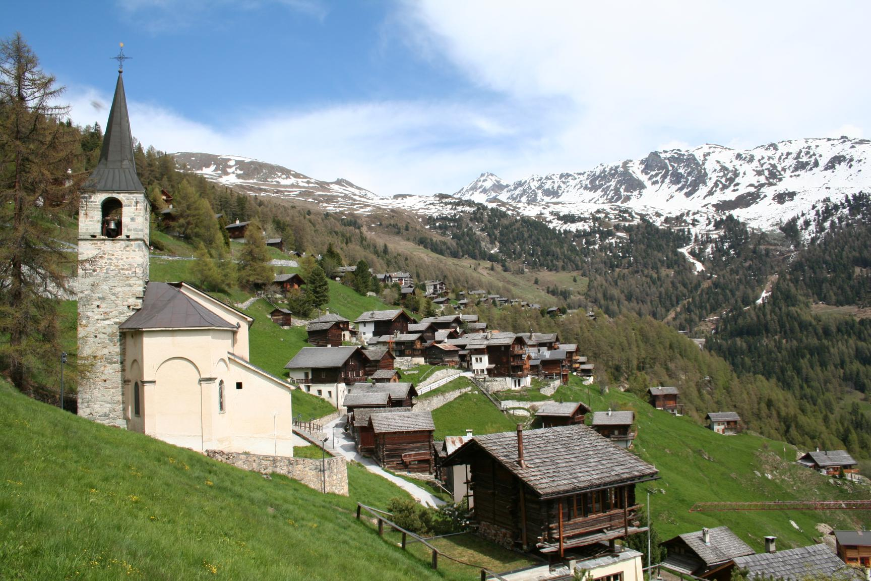 Village de Chandolin, Val d'Annivier, Valais, Suisse. Photo prise en mai 2006.